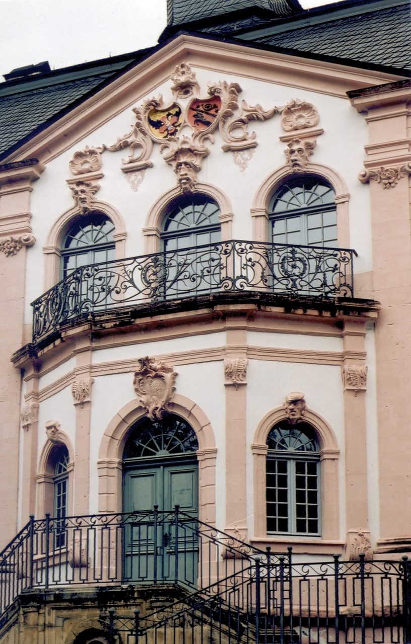 Schloss Weilerbach bei Bollendorf, Portal